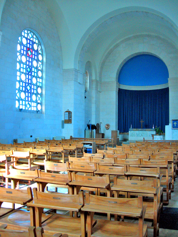 St Andrew's Church, Jerusalem